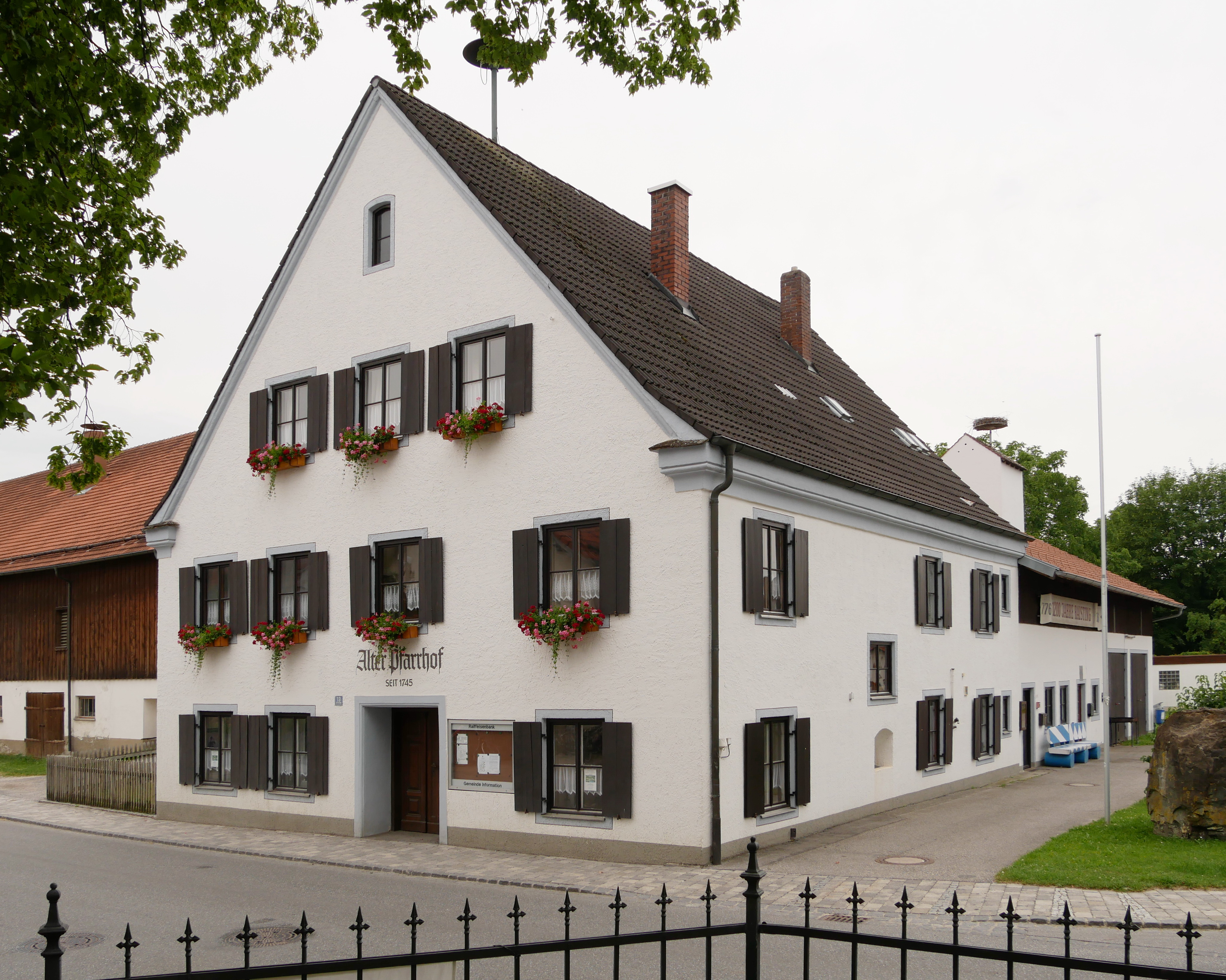 Raisting_Herrenstr. 13: Ehemaliges Katholisches Pfarrhaus, Ansicht von SO